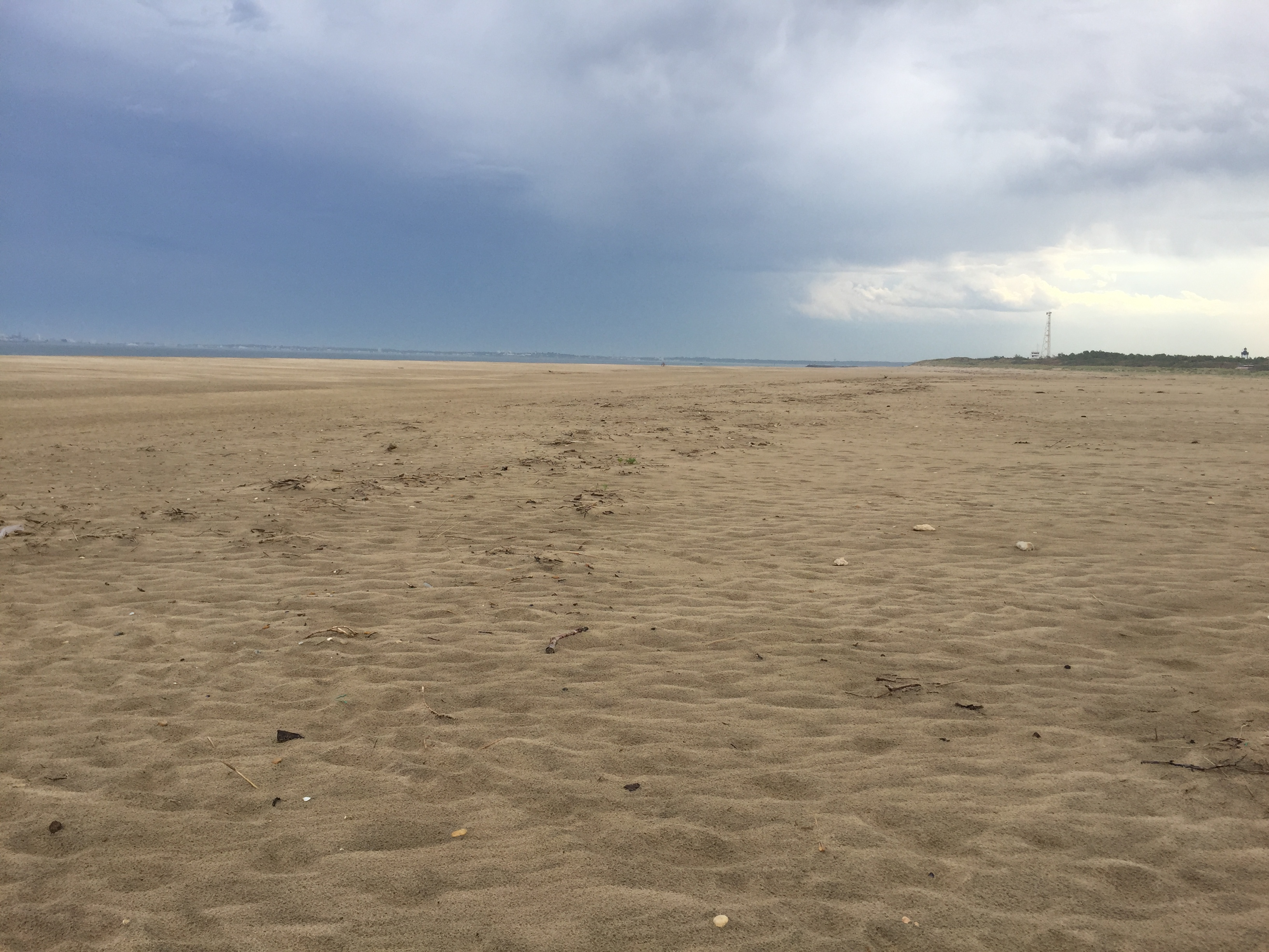 Ensablement des plages au nord de Soulac, les Arros, Les Huttes, les Cantines...